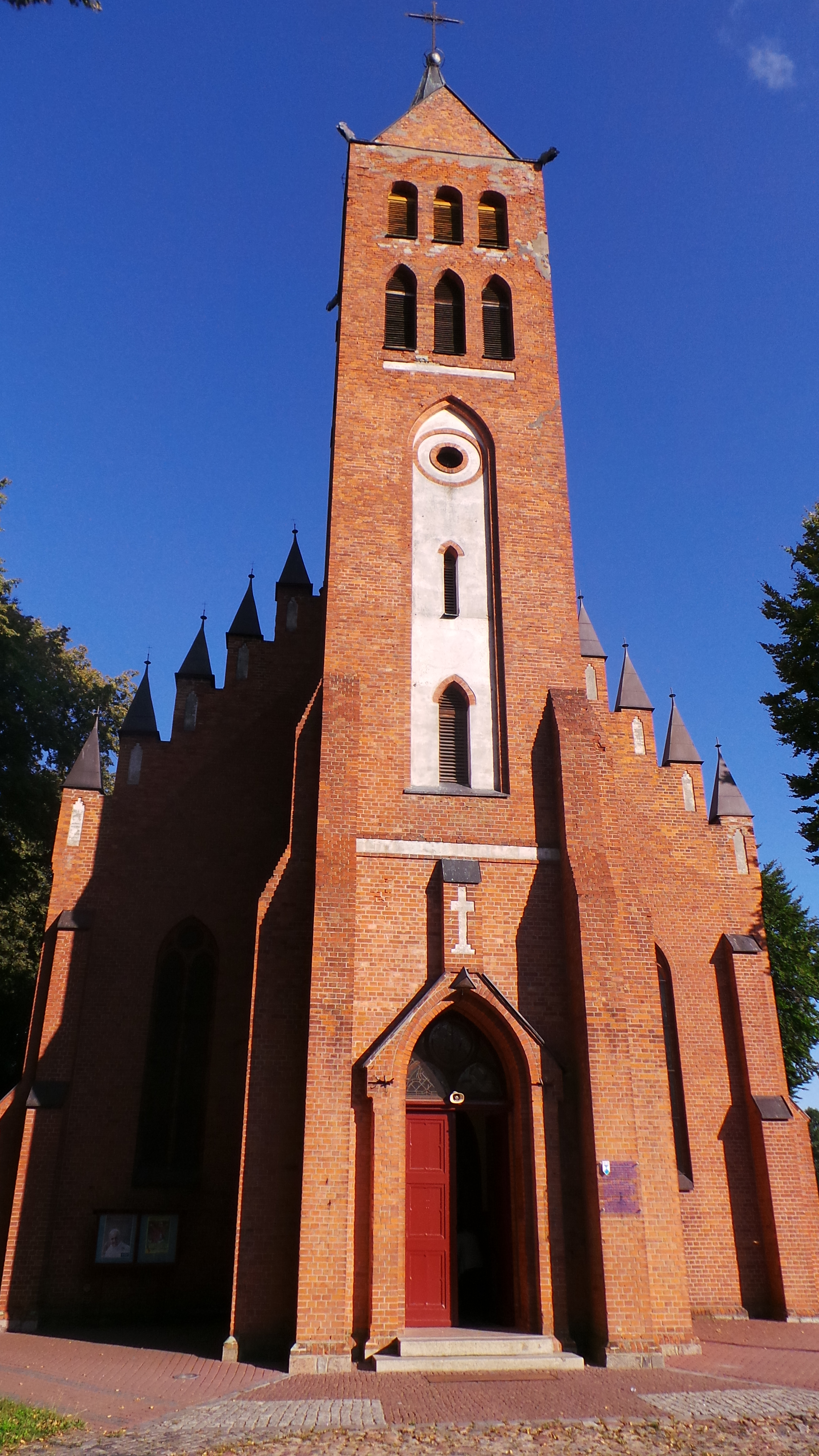 Prabuty, ul. Warszawska / ul. Kwidzyńska - kościół parafialny p.w. św. Andrzeja (d. św. Wojciecha), 1878